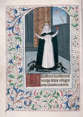 Heures à l'usage d'Autun